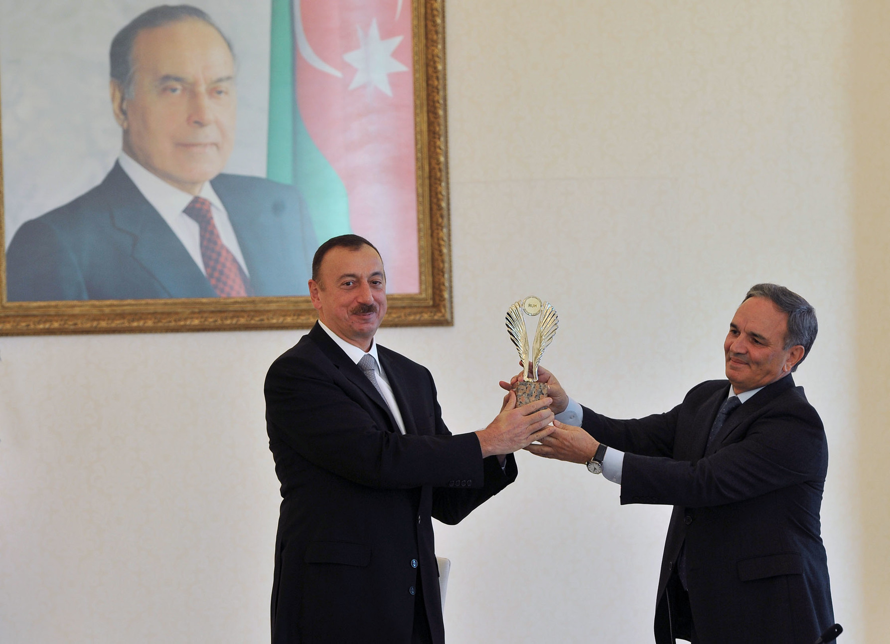 İlham Əliyevə “Jurnalistlərin dostu” mükafatı təqdim edilməsi mərasimi